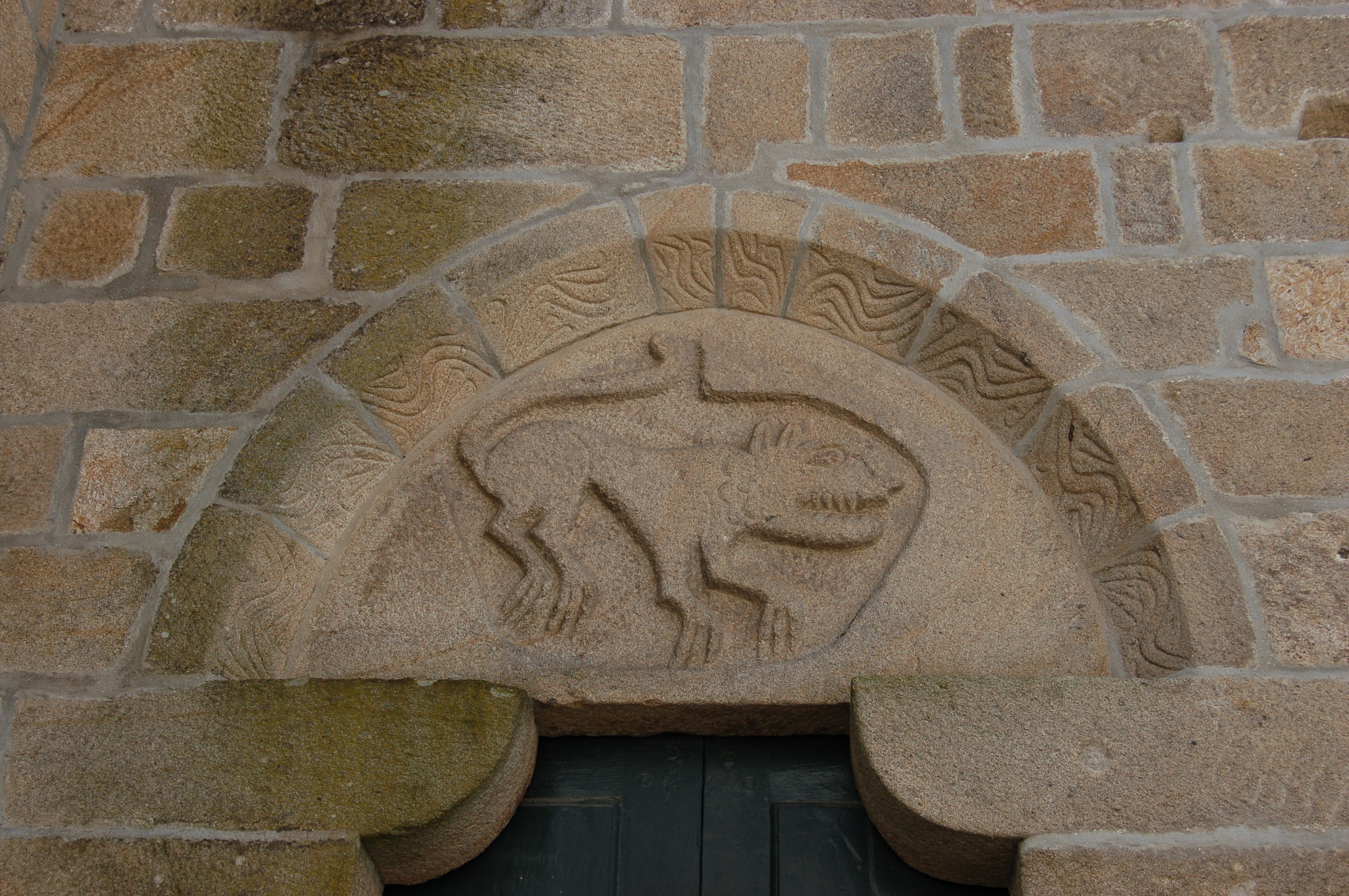 Tímpano da igrexa Matriz de Melgaço